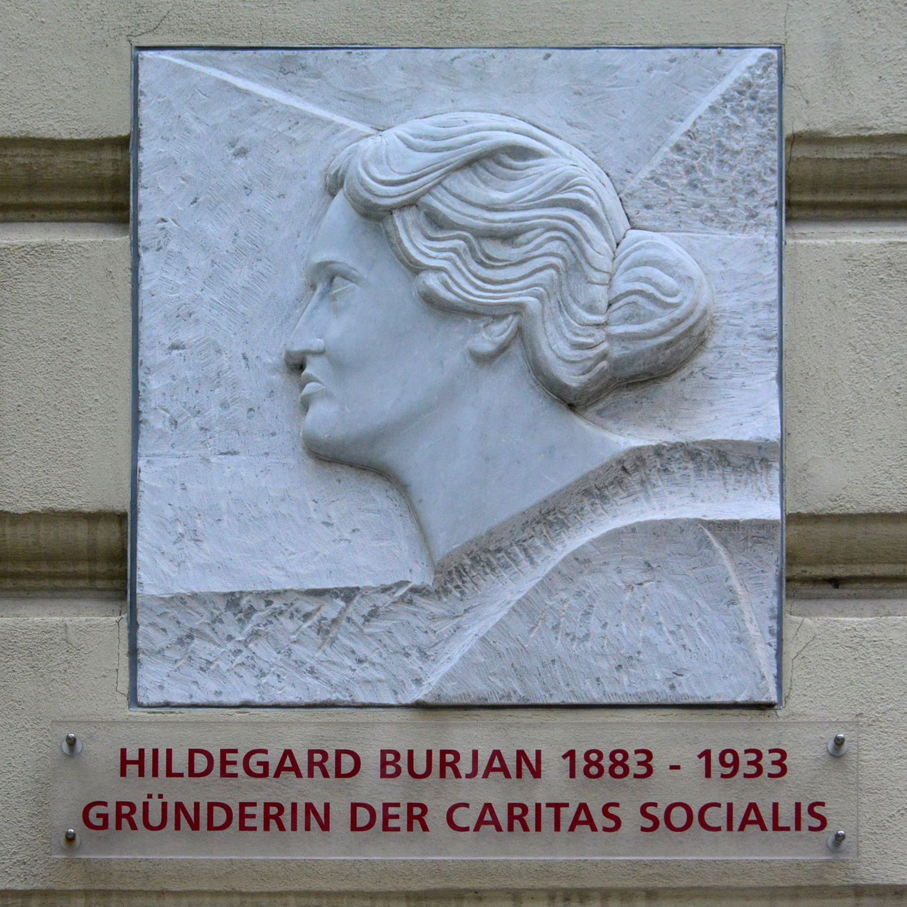 Gedenktafel für Hildegard Burjan (Wien, Pramergasse 7)